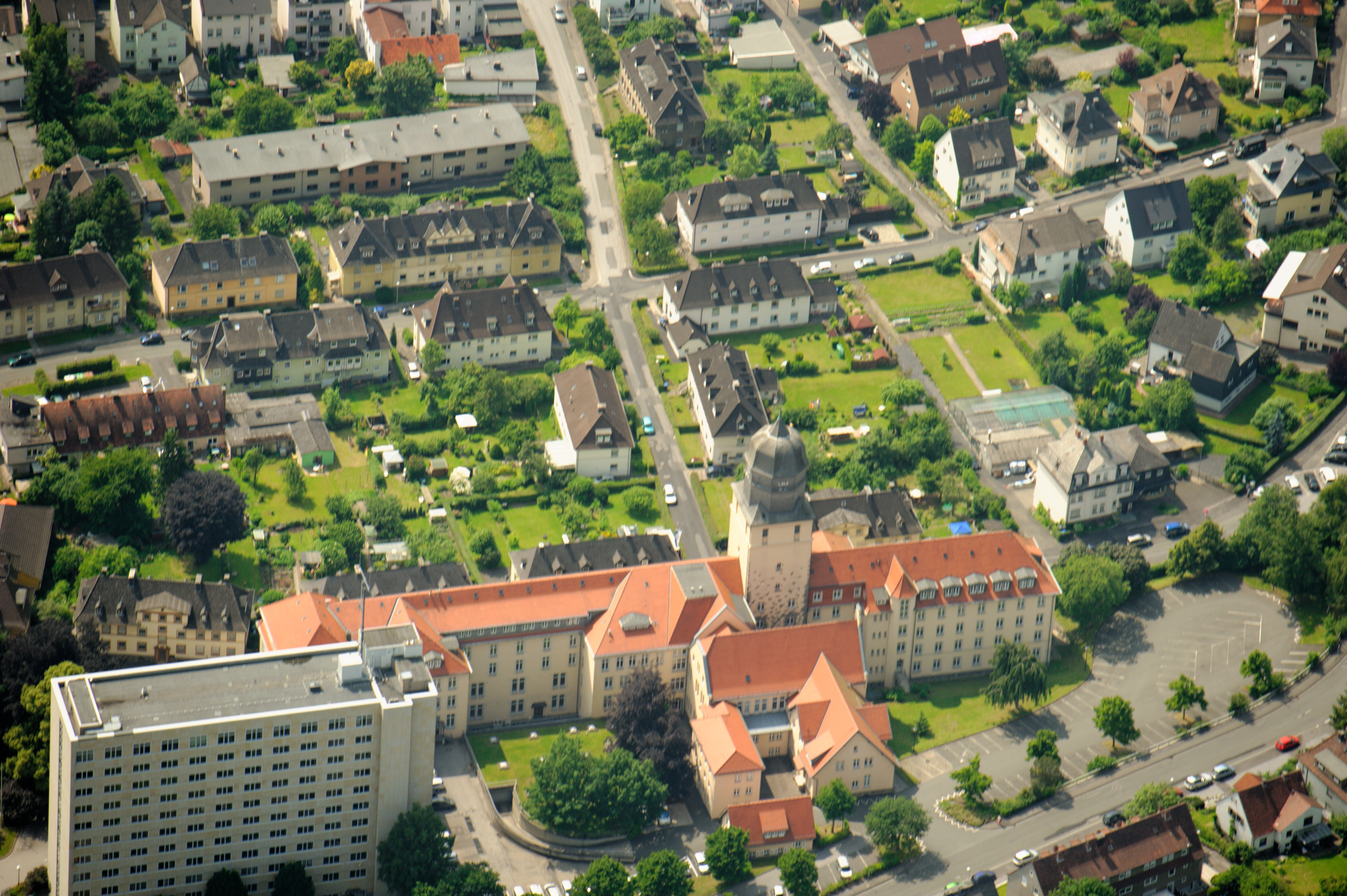 Fotoflug Sauerland-Ost - Arnsberg, Neustadt mit Bezirksregierung (Rückseite) The making of this document was supported by the Community-Budget of Wikimedia Germany.